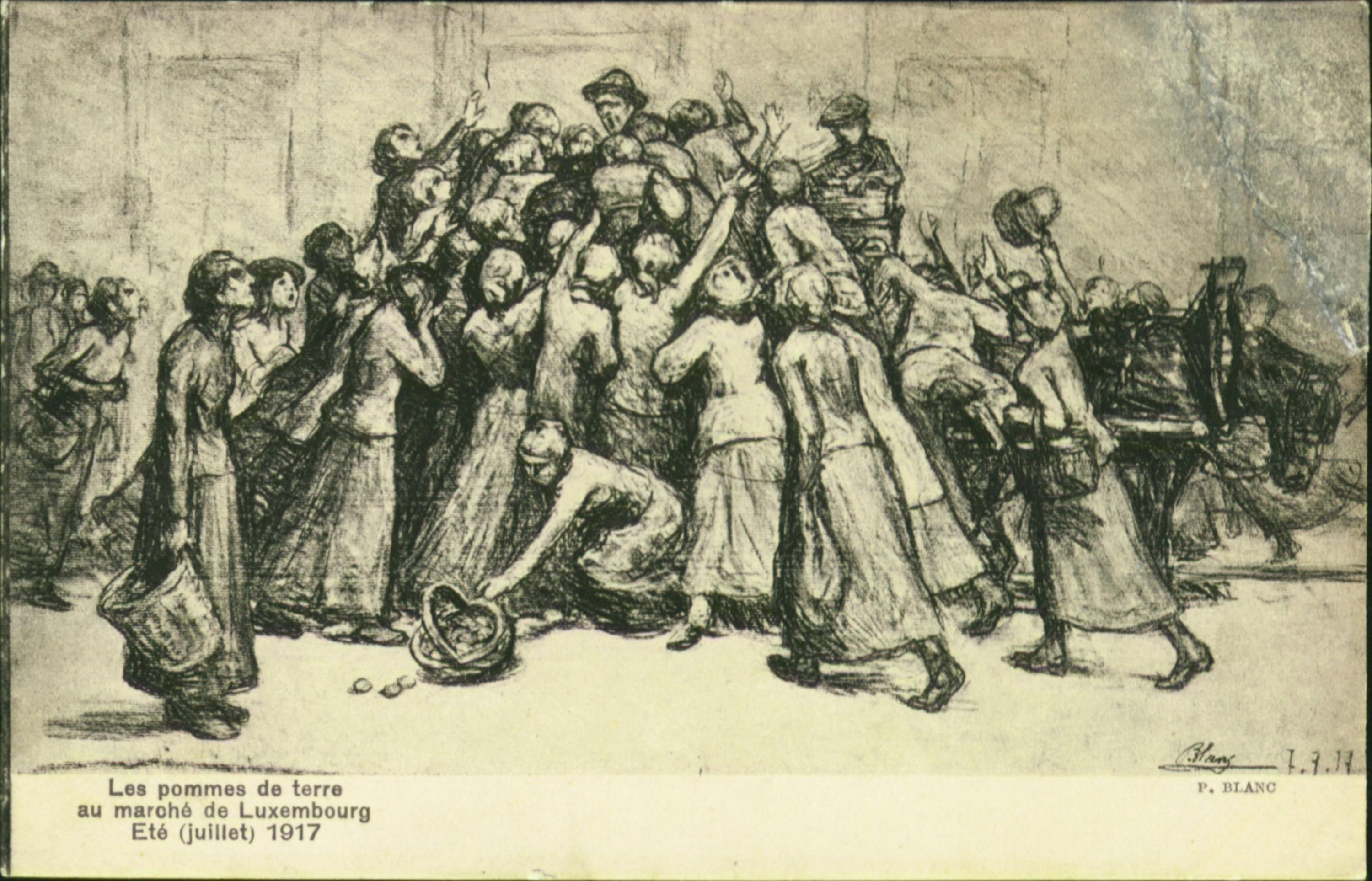 Pierre Blanc: D'Liewensmëttelkris 1917.